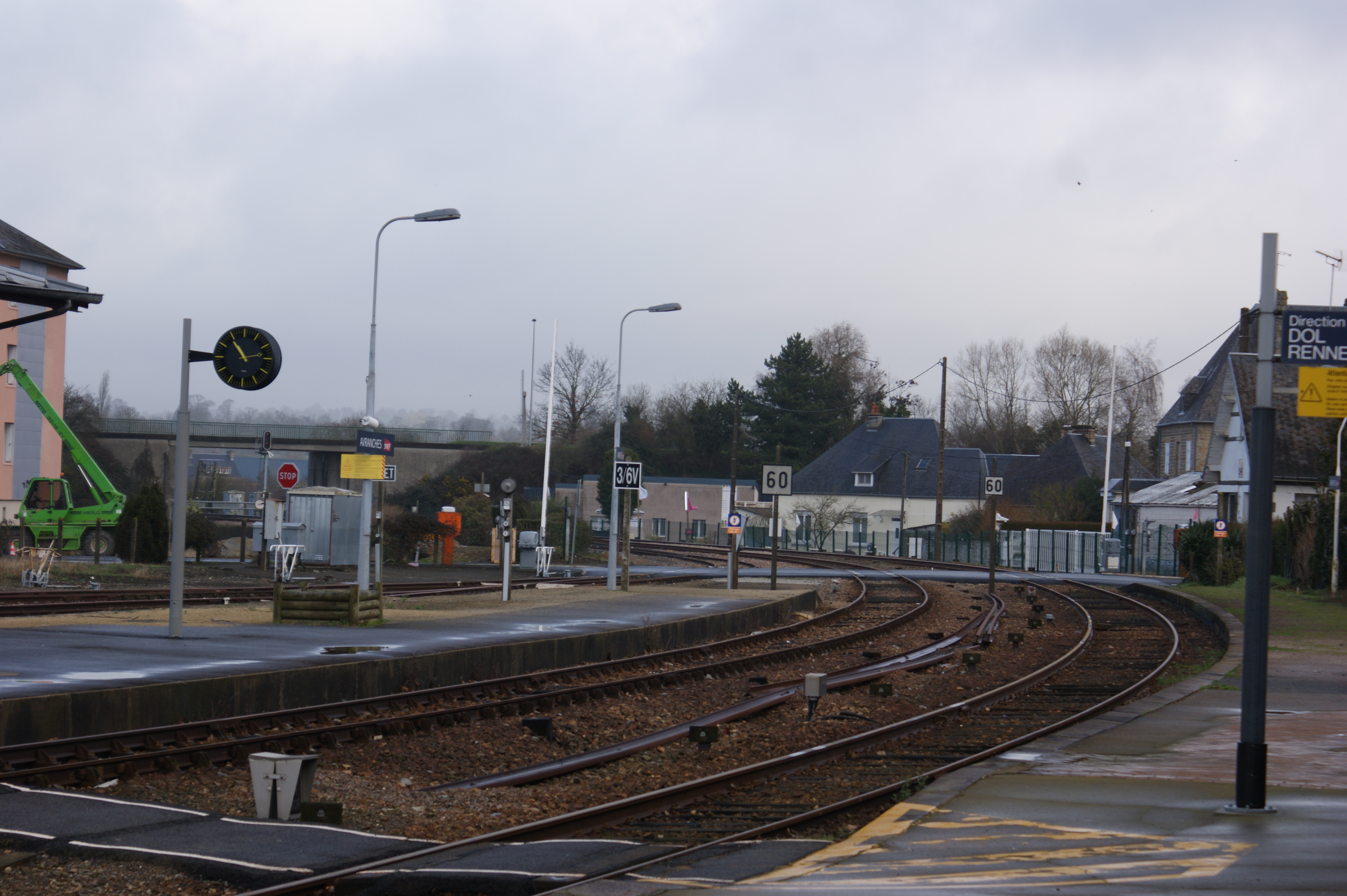 Gare d'Avranches, l'extrémité des quais et le passage à niveau en direction de Dol.